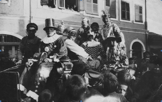 Karnevalet Shkoder